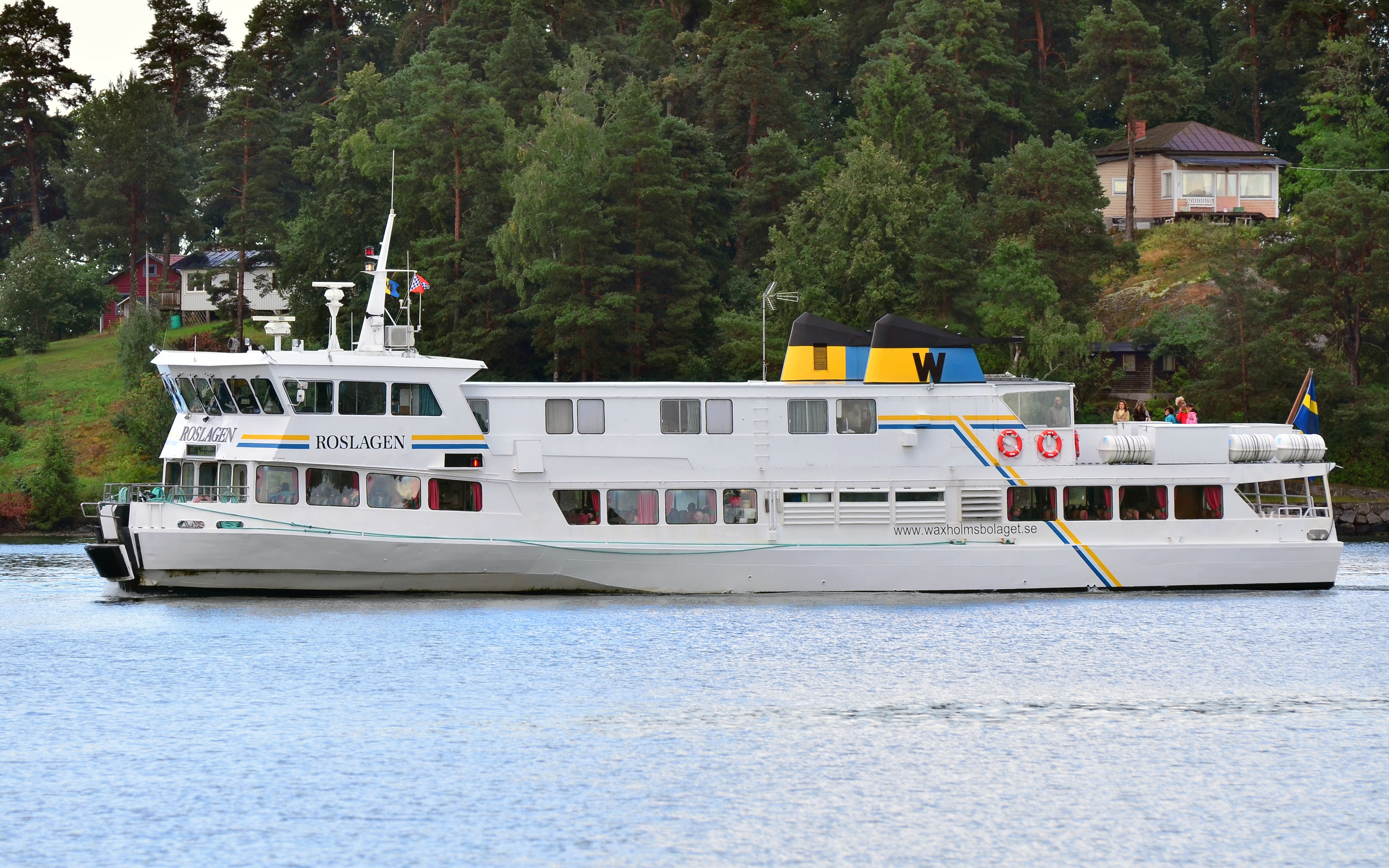 Waxholmsbolagets fartyg M/S Roslagen vid Vaxholm.